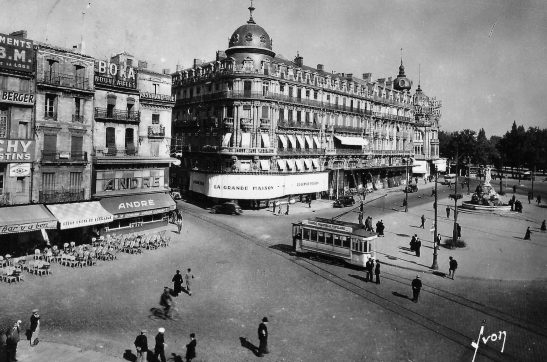 Transports en commun de Montpellier - Place de la Comédie - Motrice Brill vestibulée et rénovée à la fin de l'exploitation.